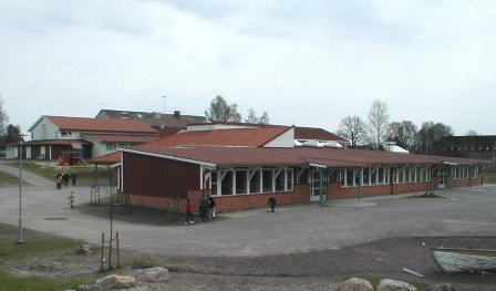 Granly skole i Horten. Bildet tatt fra tomtehjørnet i nordvest mot sørøst